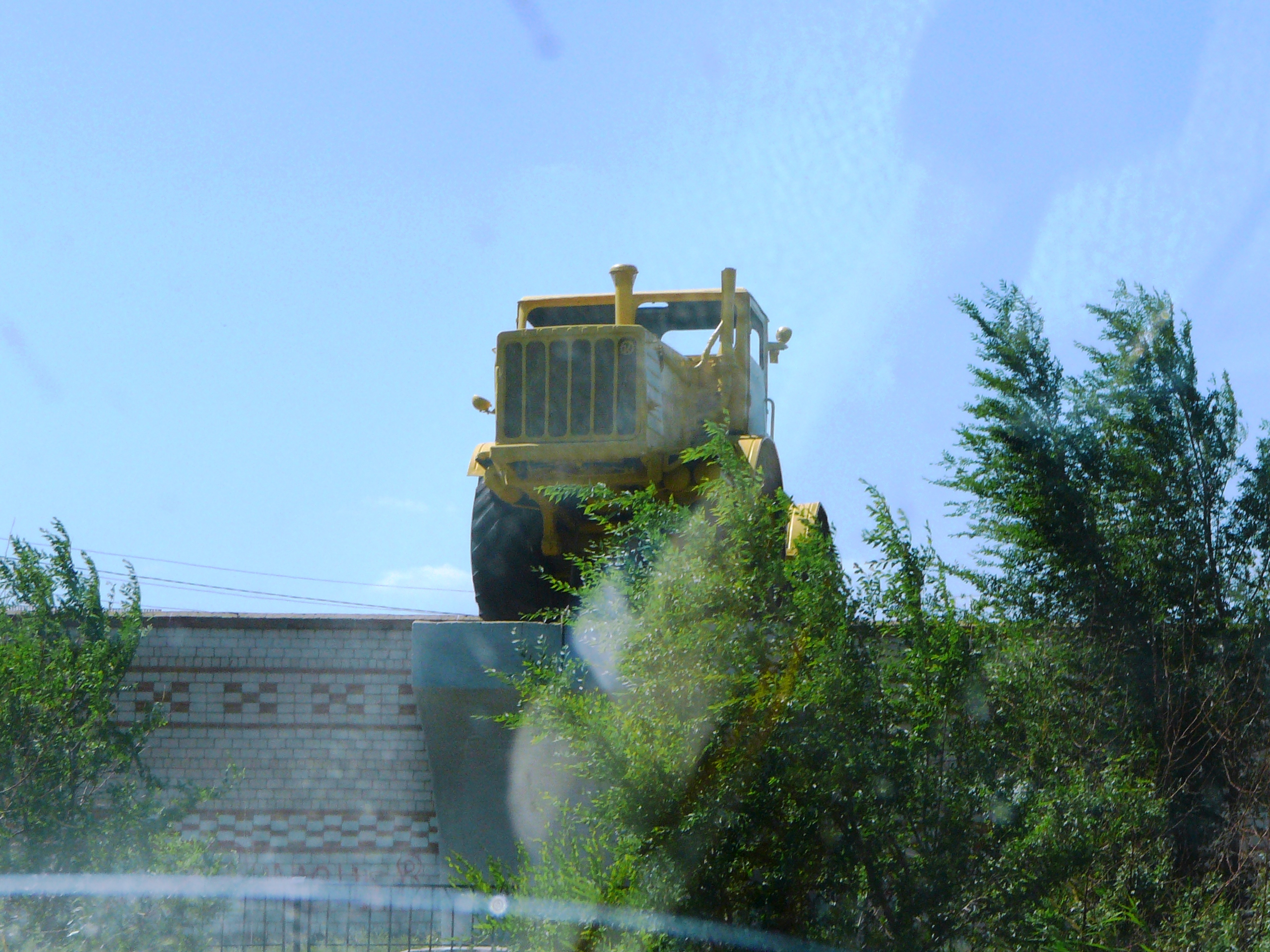 Памятник трактору К-700